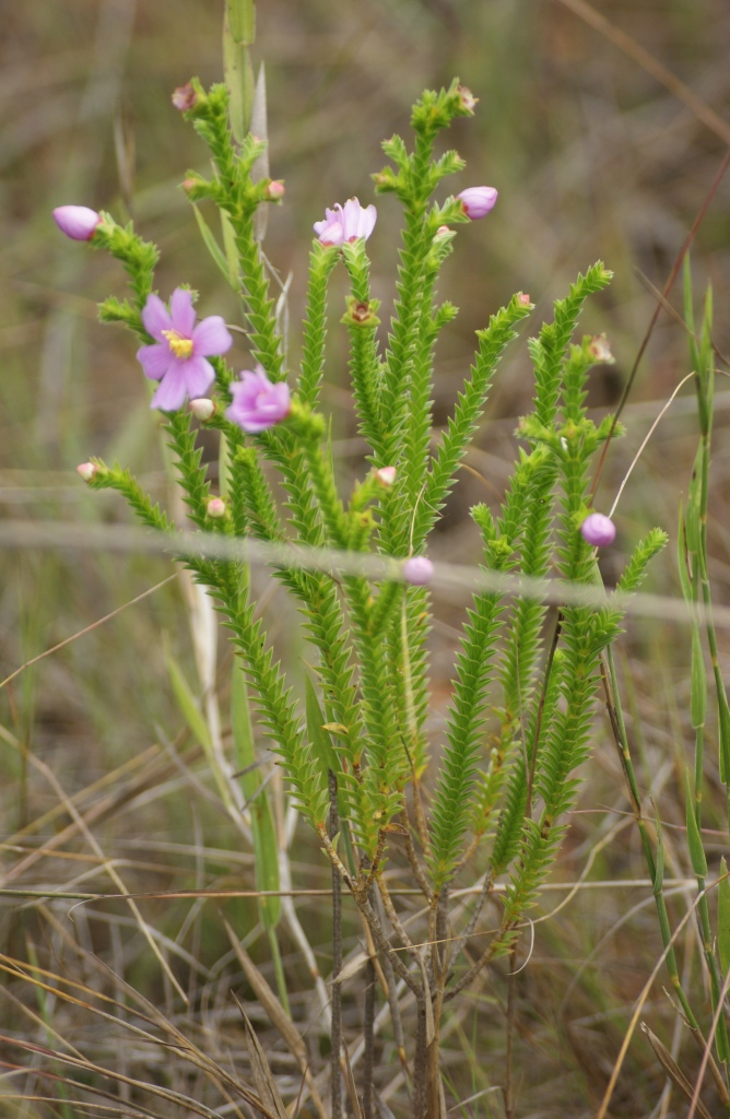 Lavoisiera phyllocalycina - MELASTOMATACEAE Parque Nacional de Brasília - Brasília - DF - Brasil